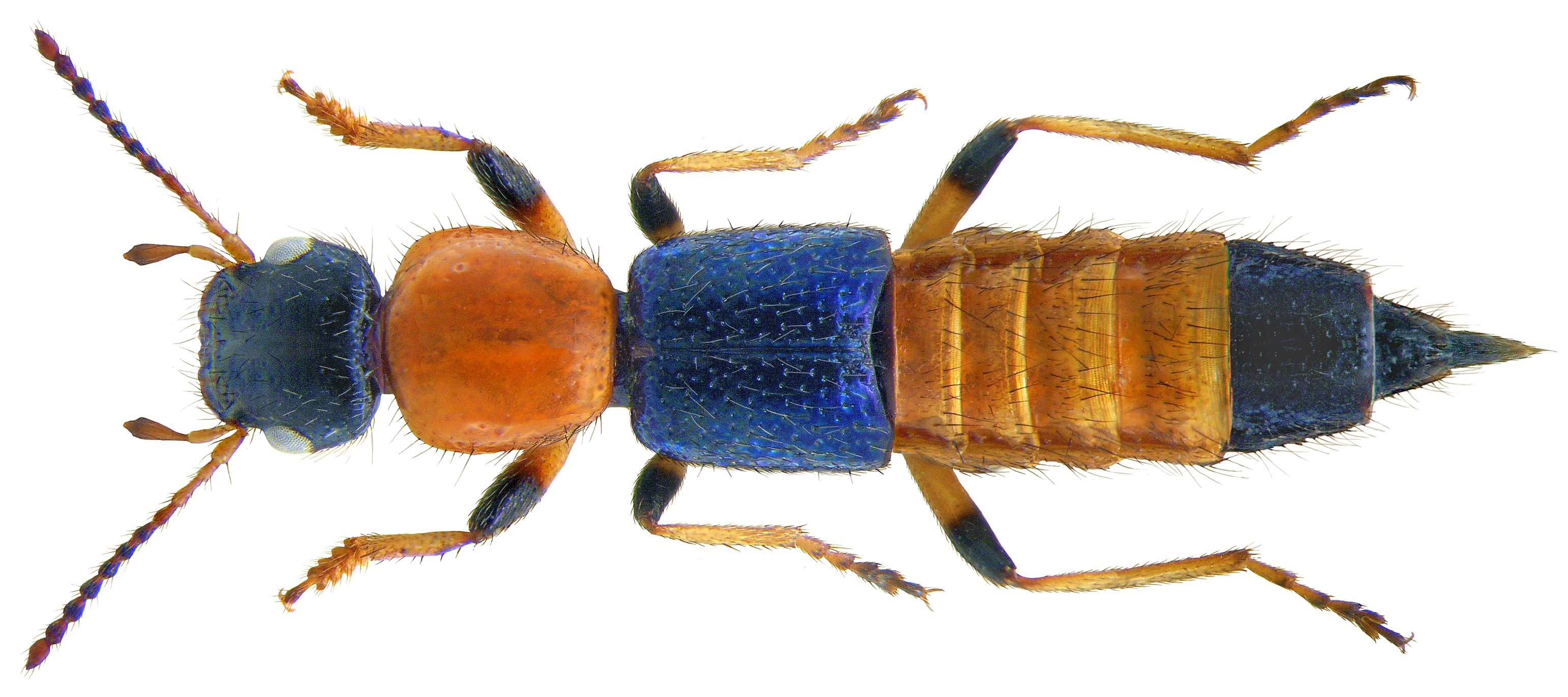 Familie: Staphylinidae Grösse: 7,5-8,5 mm Verbreitung: Europa Ökologie: besonders auf Lehmboden; verbreitet aber selten Fundort: Korsika, Ghisonaccia, Tour de Vignale leg.det. U.Schmidt, 1973 Foto: U.Schmidt, 2009